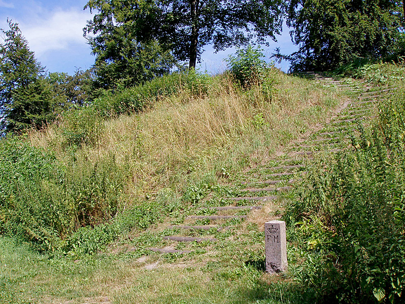 'Dansk: Bygholm, ', er en herregård i Horsens, Nim Herred, Jylland, Danmark. Voldsted i parken, hvor den oprindelige borg har ligget. Image taken by me user:Nico-DK / Nils Jepsen